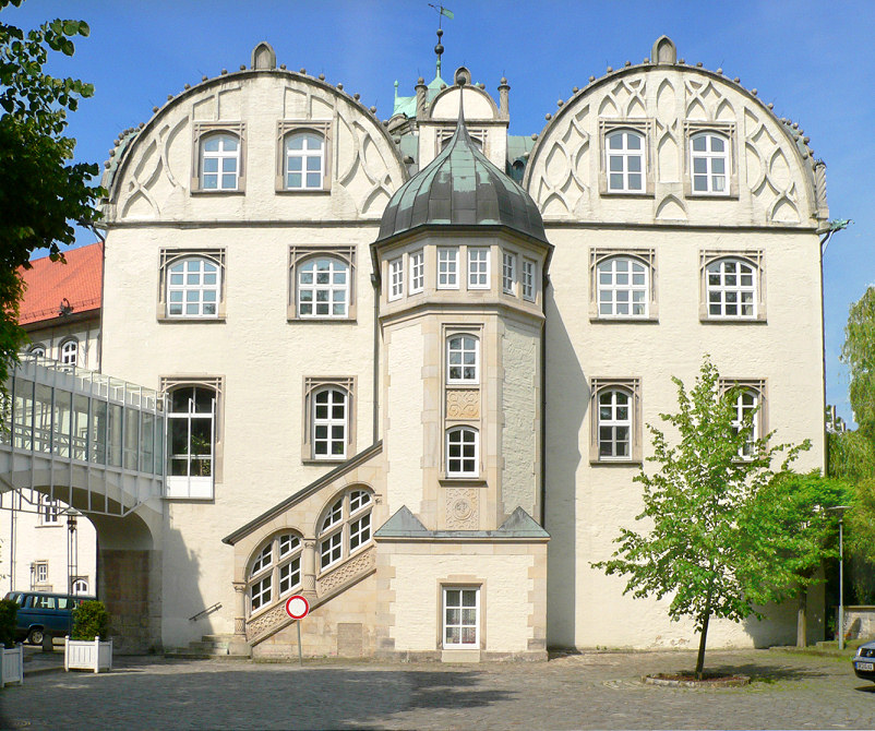 Torhaus Schloss Gifhorn Foto aufgenommen von Benutzer User:AxelHH, Juni 2005